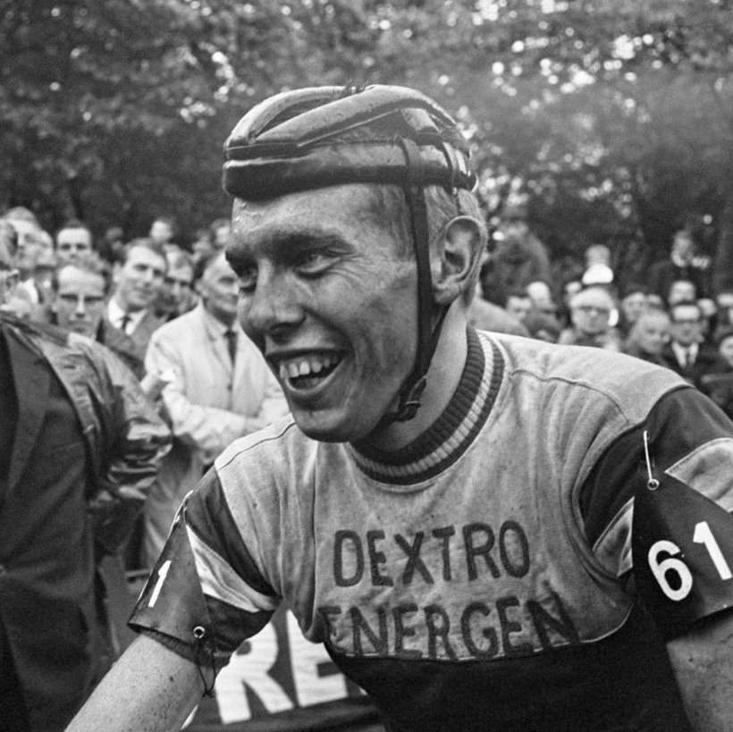 Olympiatoer 1965, Gerard Koel